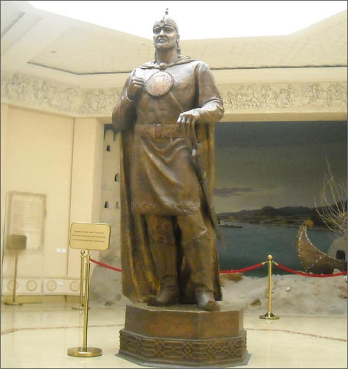 Тоҷикӣ: Муҷассамаи Темурмалик дар Осорхонаи таърихии вилояти. ш. Хуҷанд